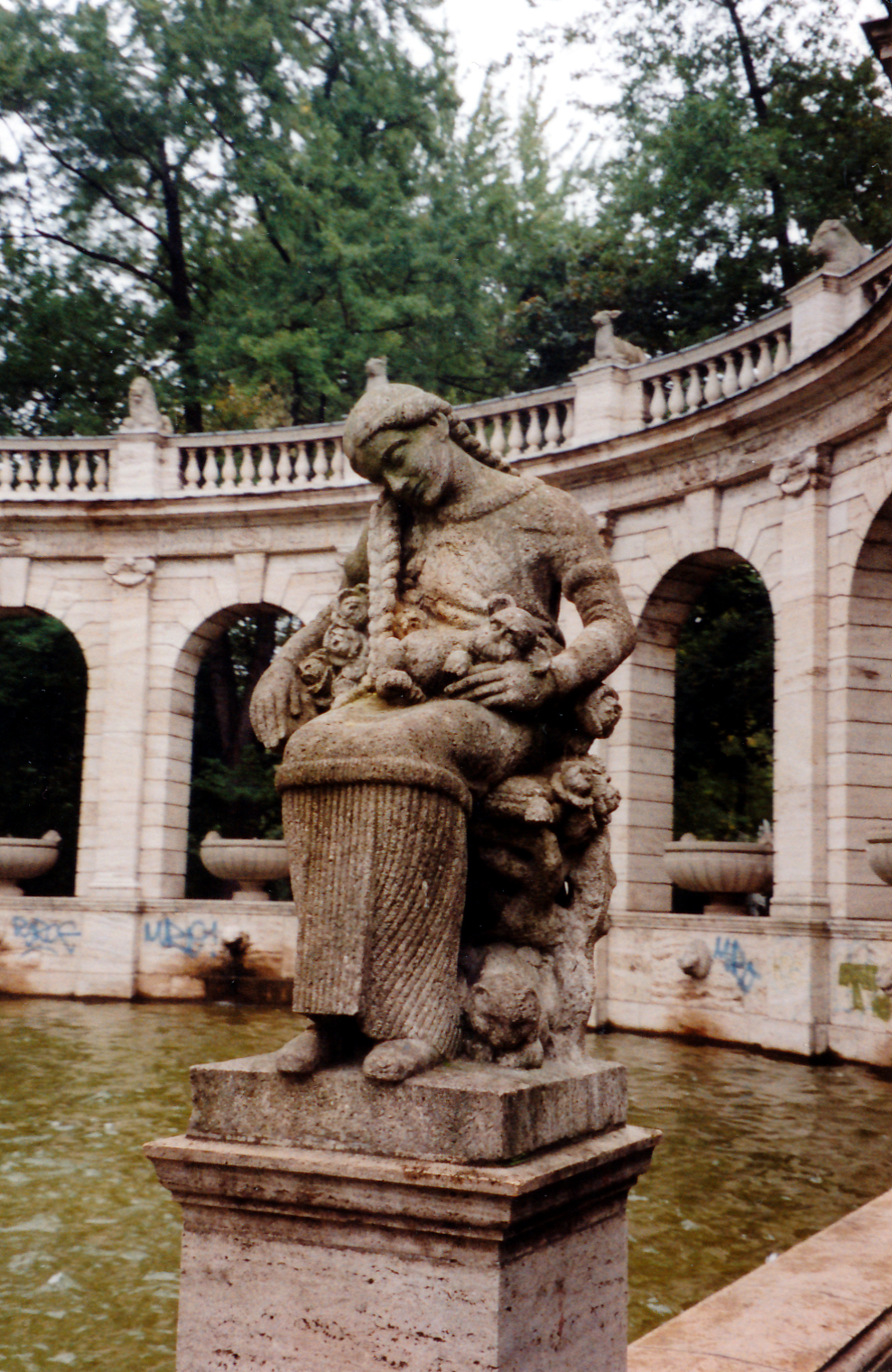 Skulptur "Dornröschen" am Märchenbrunnen in Berlin-Friedrichshain. Foto vom September 1998 Vereinfacht wiederhergestellt nach den Kriegszerstörungen, wurde der Märchenbrunnen 1951 mit gröberen Nachbildungen der Brunnenfiguren von Ignatius Taschner (1871–1913) wieder eröffnet. Die Figuren standen 5 Jahrzehnte und wurden von den Kindern ebenso geliebt wie vorher die Taschner'schen Originalfiguren bzw. nachher die originalgetreuen Nachbildungen.